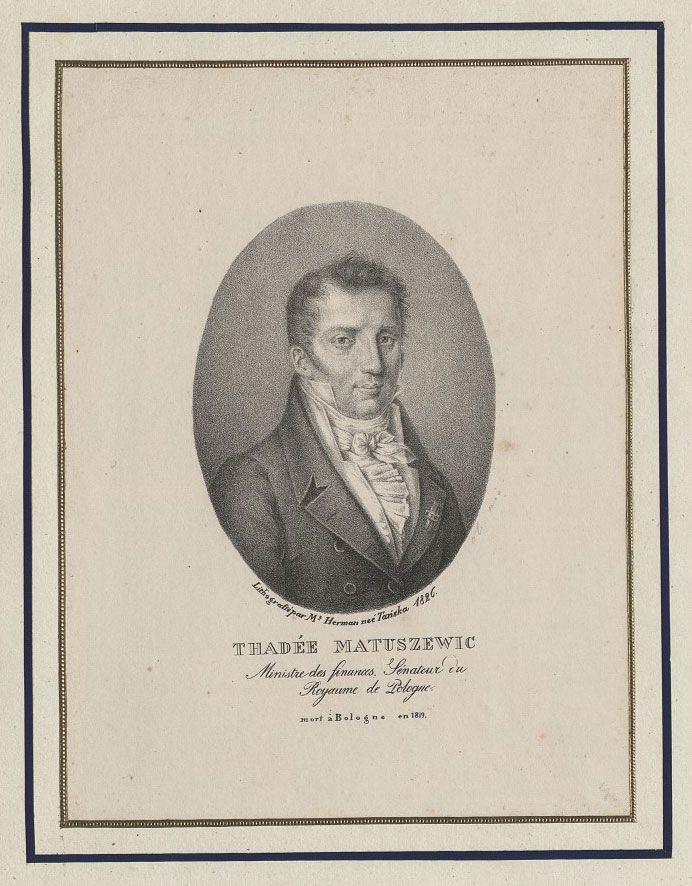 Беларуская (тарашкевіца): Тадэвуш Матушэвіч